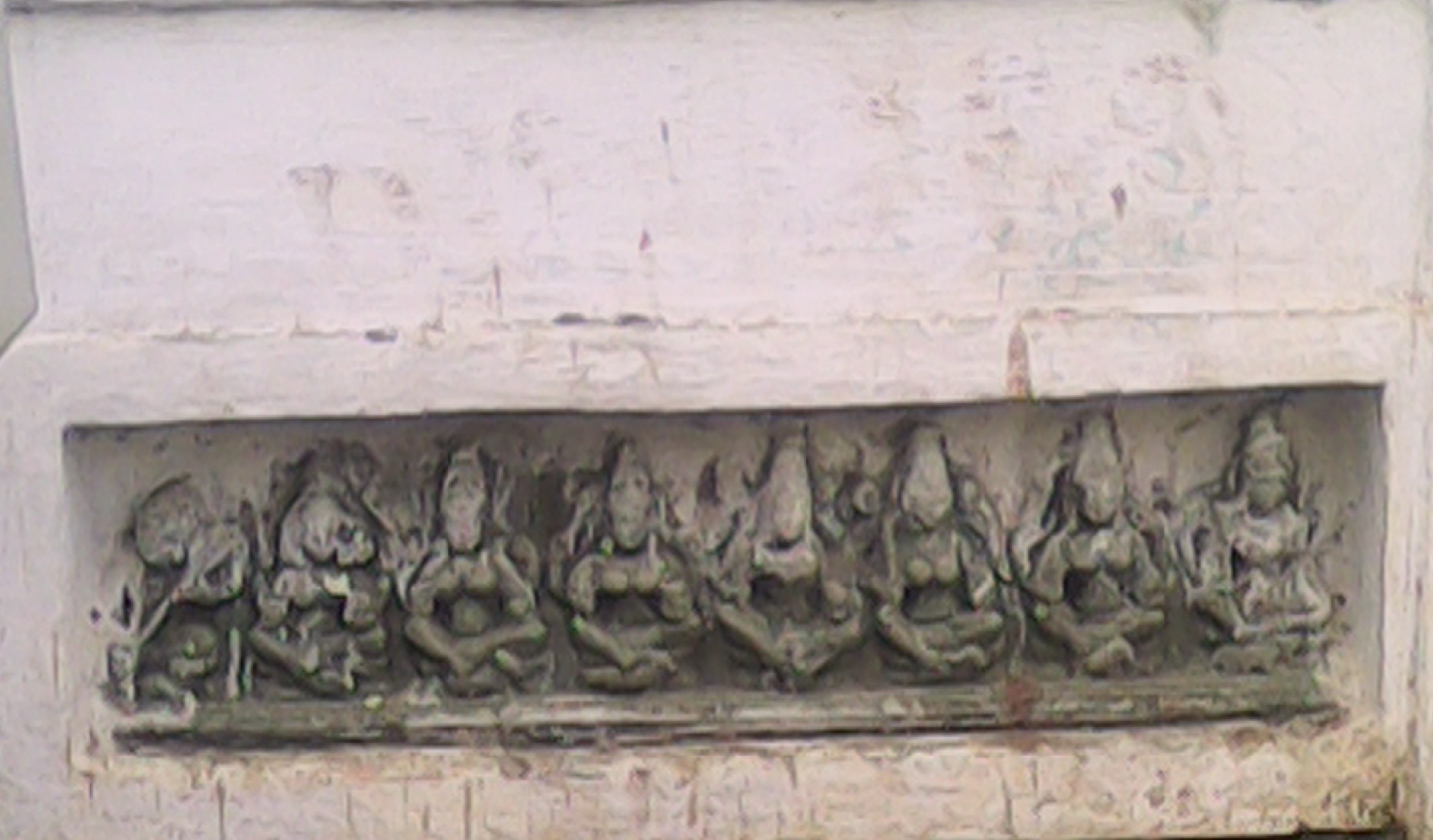 ಕನ್ನಡ: ಸಪ್ತಮಾತೃಕೆಯರು